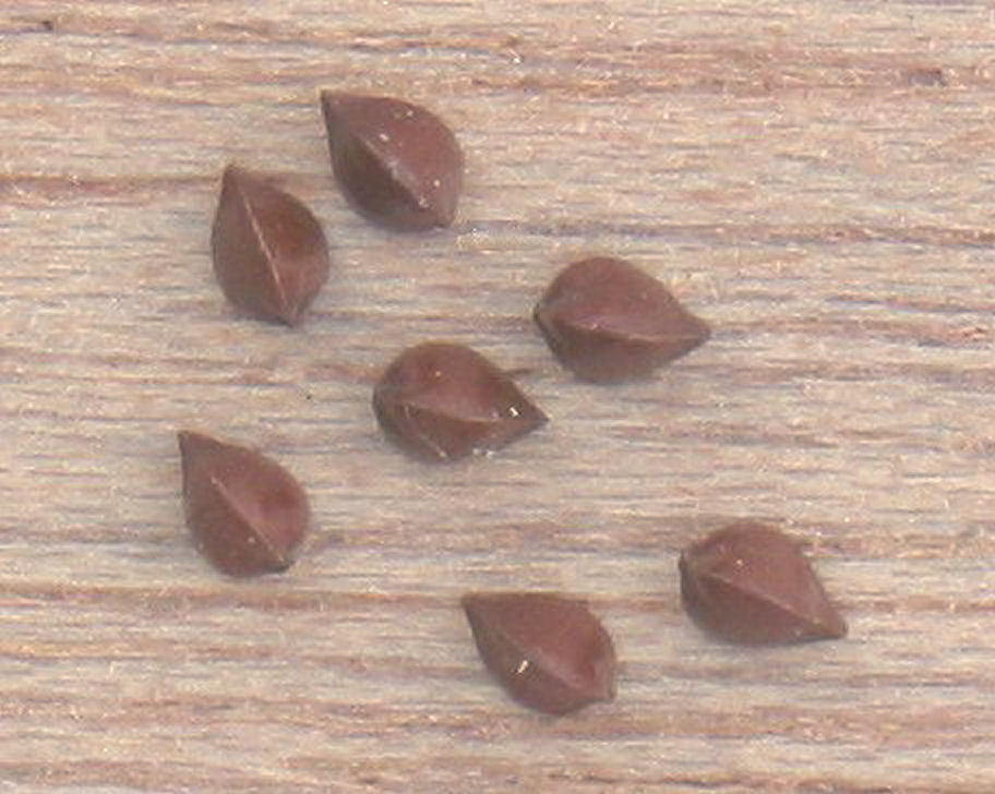 (Ridderzuring zaden) Rumex obtusifolius seeds